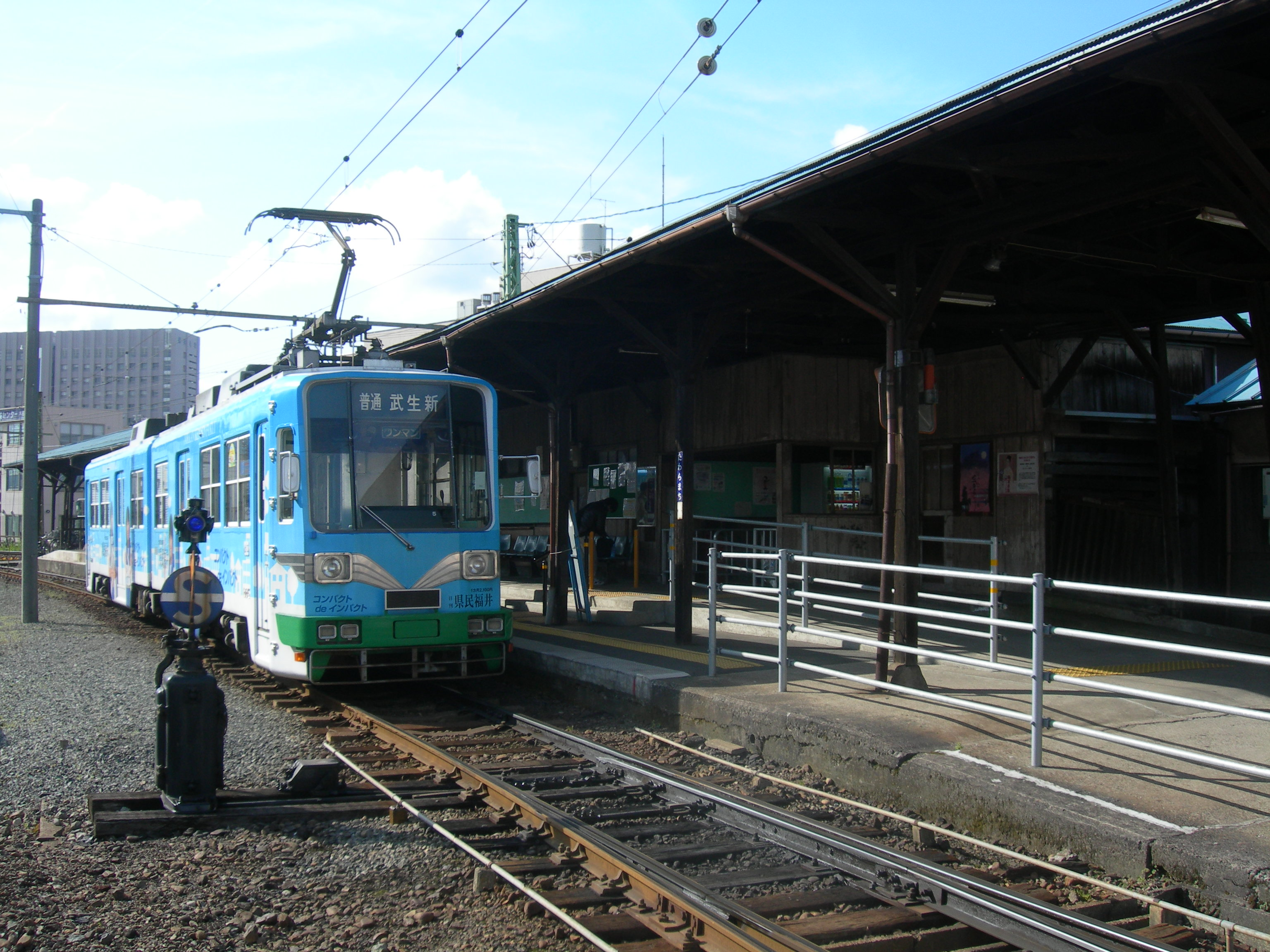 田原町駅ホーム